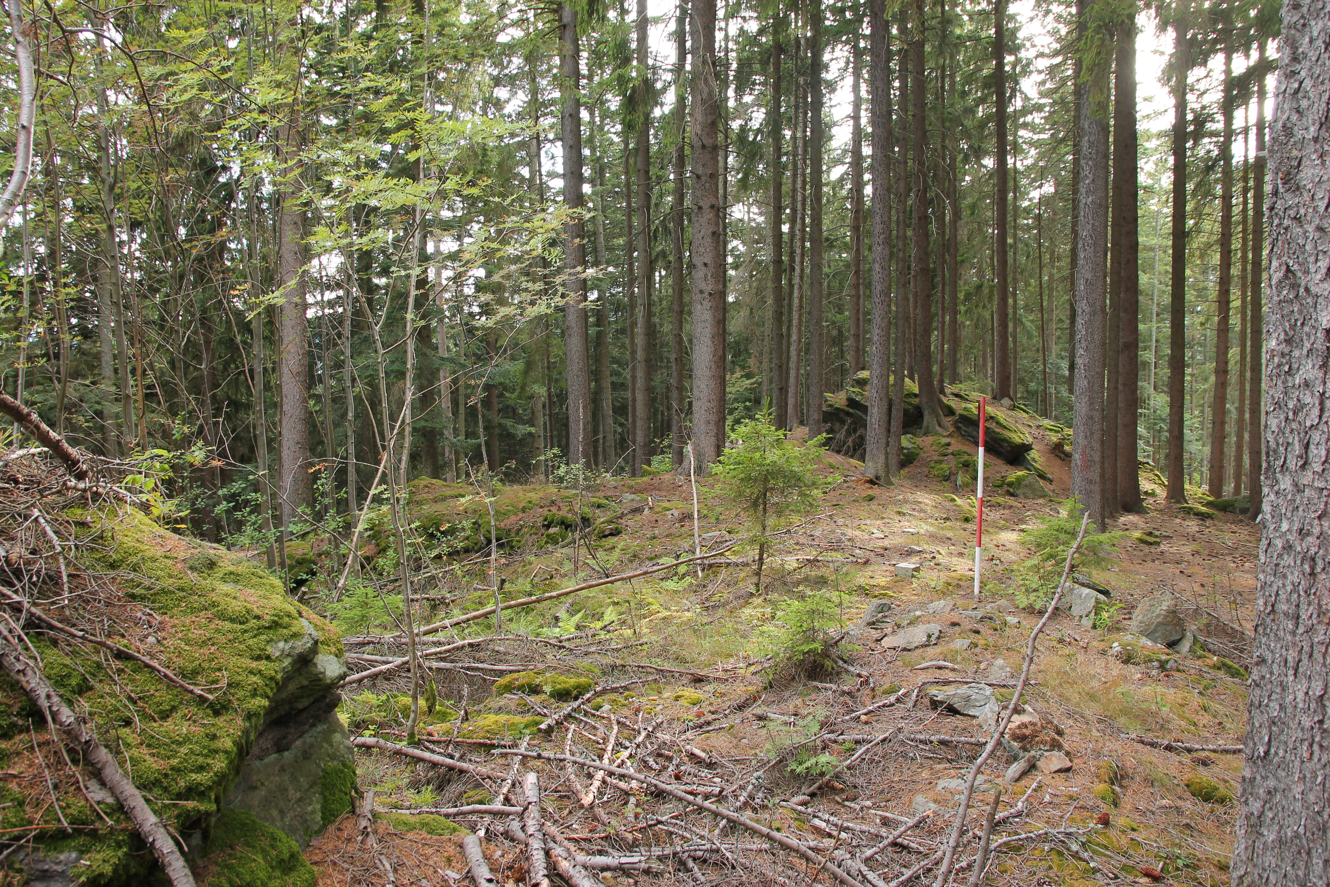 Vrch Zahájený (845 m) v Pošumaví